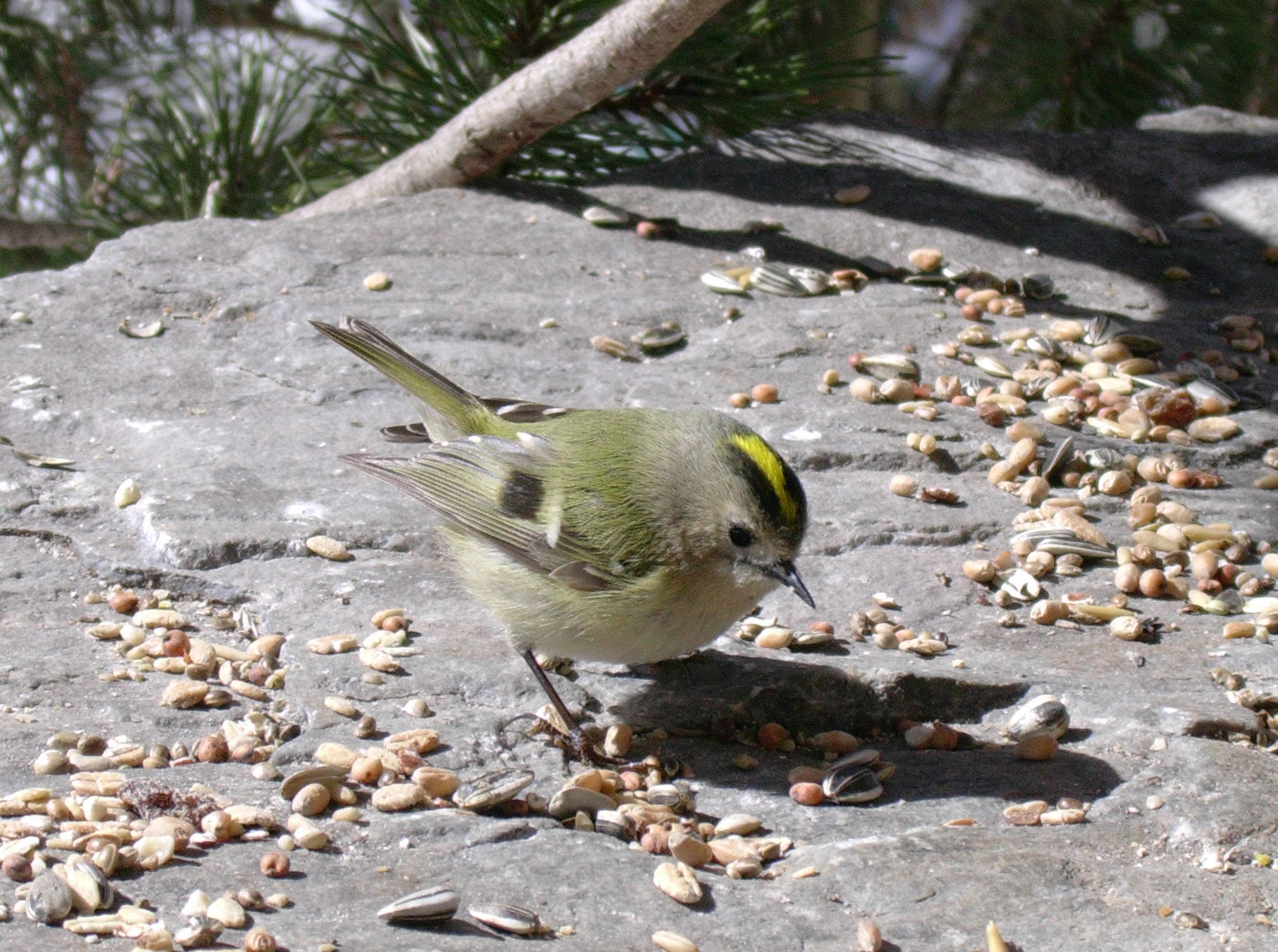 Roitelet huppé